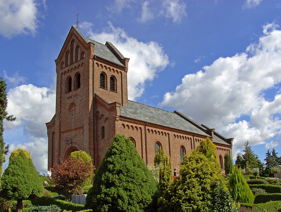 fra sydvest